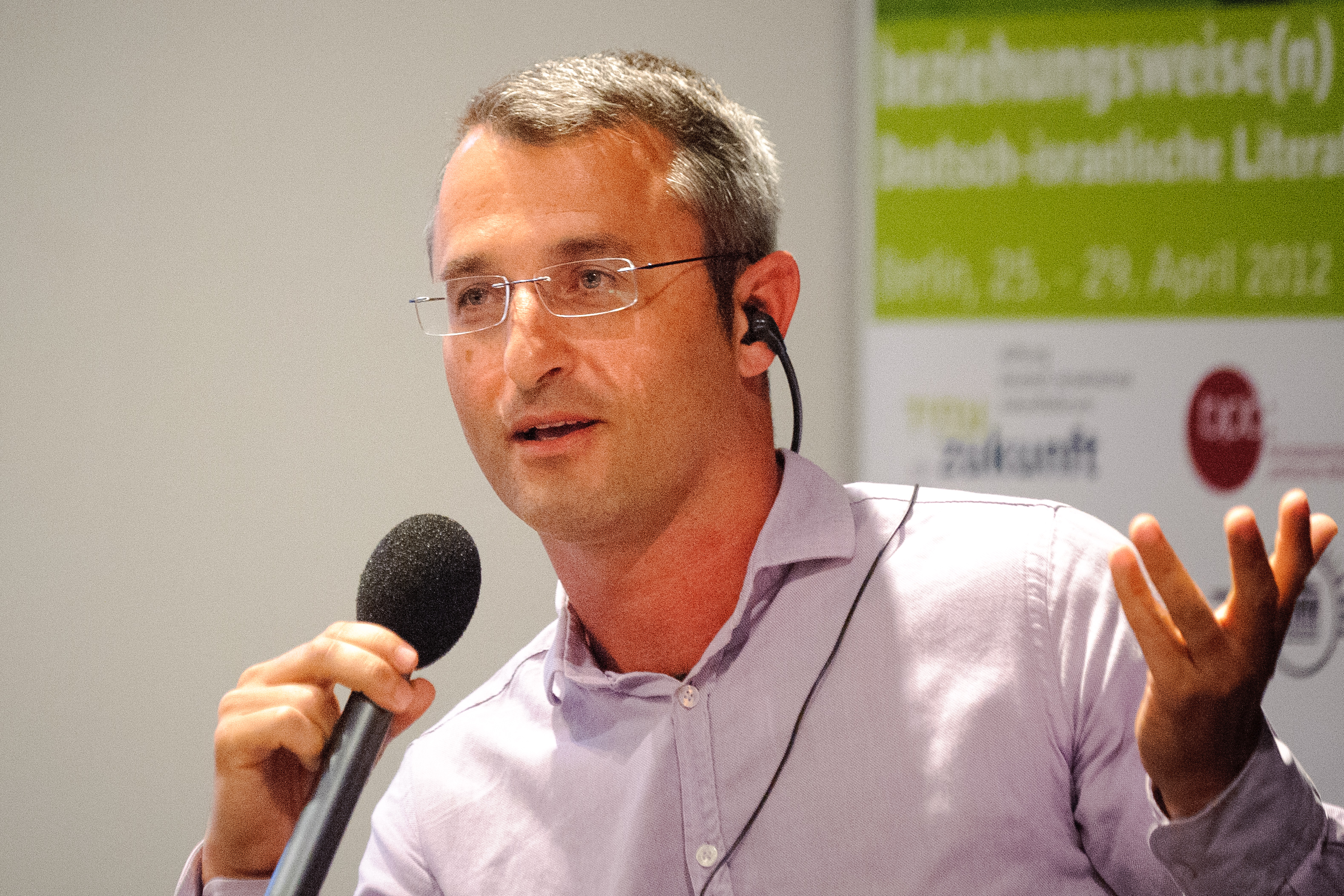 Eshkol Nevo (Schriftsteller, Israel) Die deutsch-israelischen Literaturtage - organisiert vom Goethe-Institut und der Heinrich-Böll-Stiftung - finden seit sechs Jahren abwechselnd in Berlin und in Tel Aviv statt. Neben Lesungen und Diskussionen gibt es im April auch Filme zu sehen. Abgeschlossen wird *beziehungsweise(n)* durch eine Diskussionsrunde, in der Aktivist/innen, Journalist/innen und Autor/innen über den Begriff der Solidarität, über gesellschaftliche Vorstellungen des Zusammenhalts und der sozialen Gerechtigkeit debattieren. Foto: Stephan Röhl